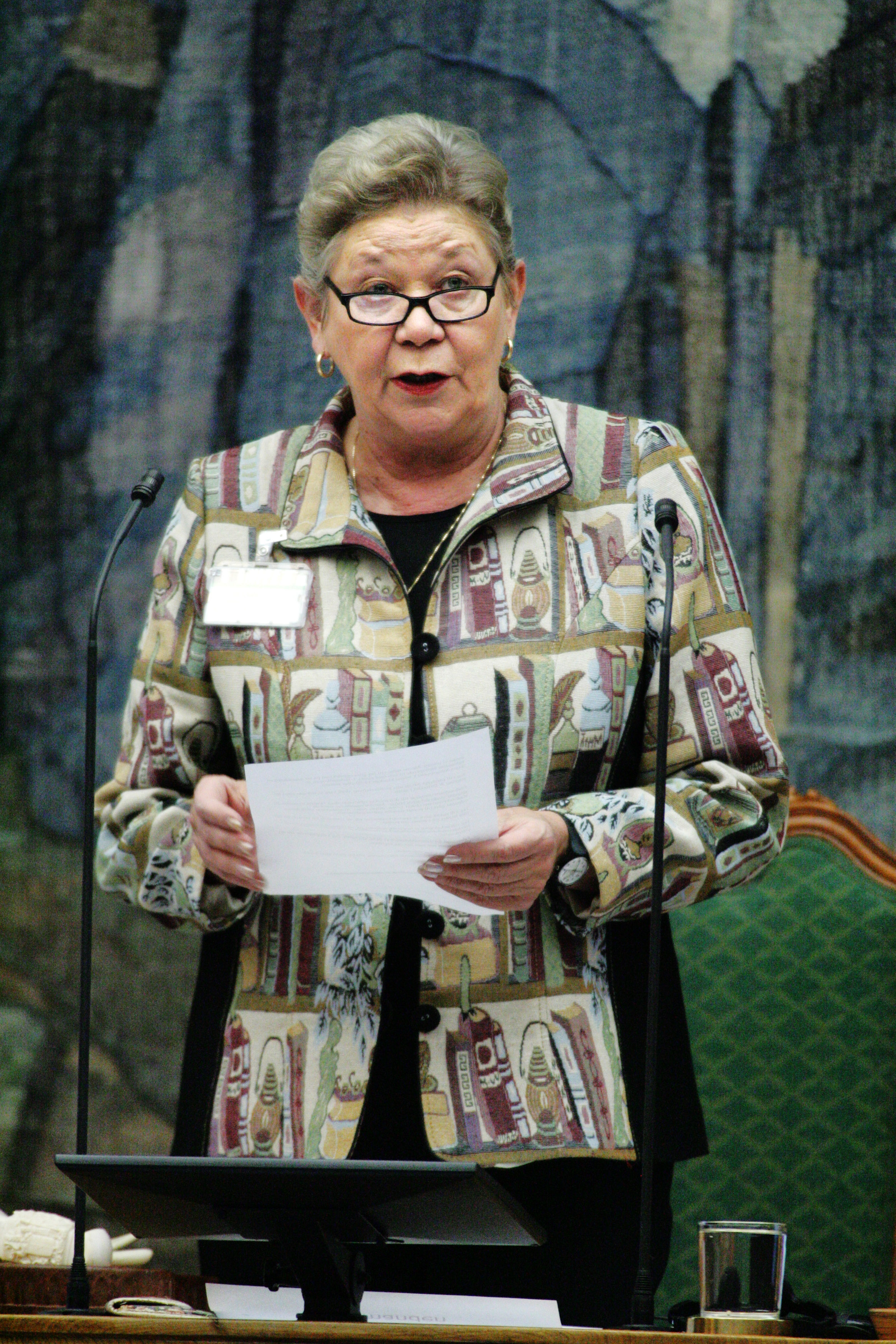 Outi Ojala (vänst) Finland, under Nordiska rådets session i Köpenhamn 2006.